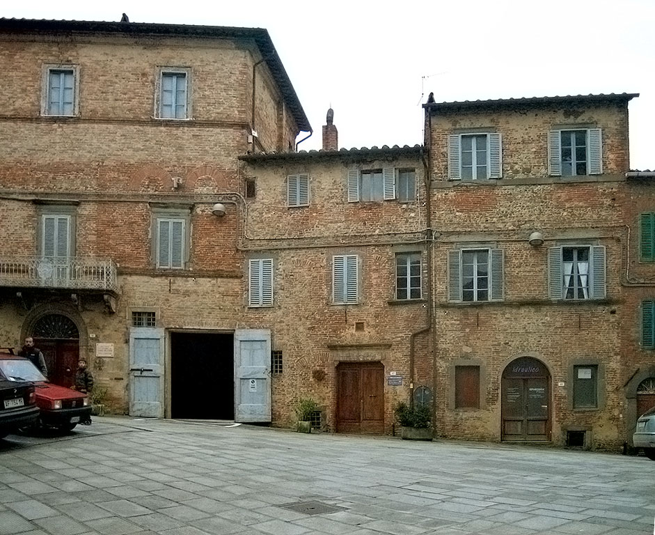 Città della Pieve, Umbria, Italiamain square